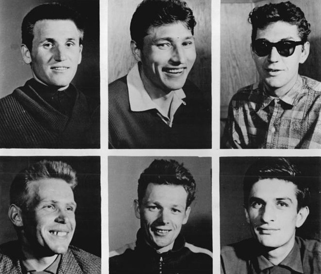 Friedensfahrt, Mannschaft aus Polen Zentralbild Repro 22.4.1961 Friedensfahrtmannschaft der Volksrepublik Polen. Obere Reihe vlnr: Stanislaw Gazda, Stanislaw Krolak, Andrezeij Piechaczek Untere Reihe vlnr: Wieslaw Jarzebski, Beguslaw Fornalczvk, Jozef Bekier.